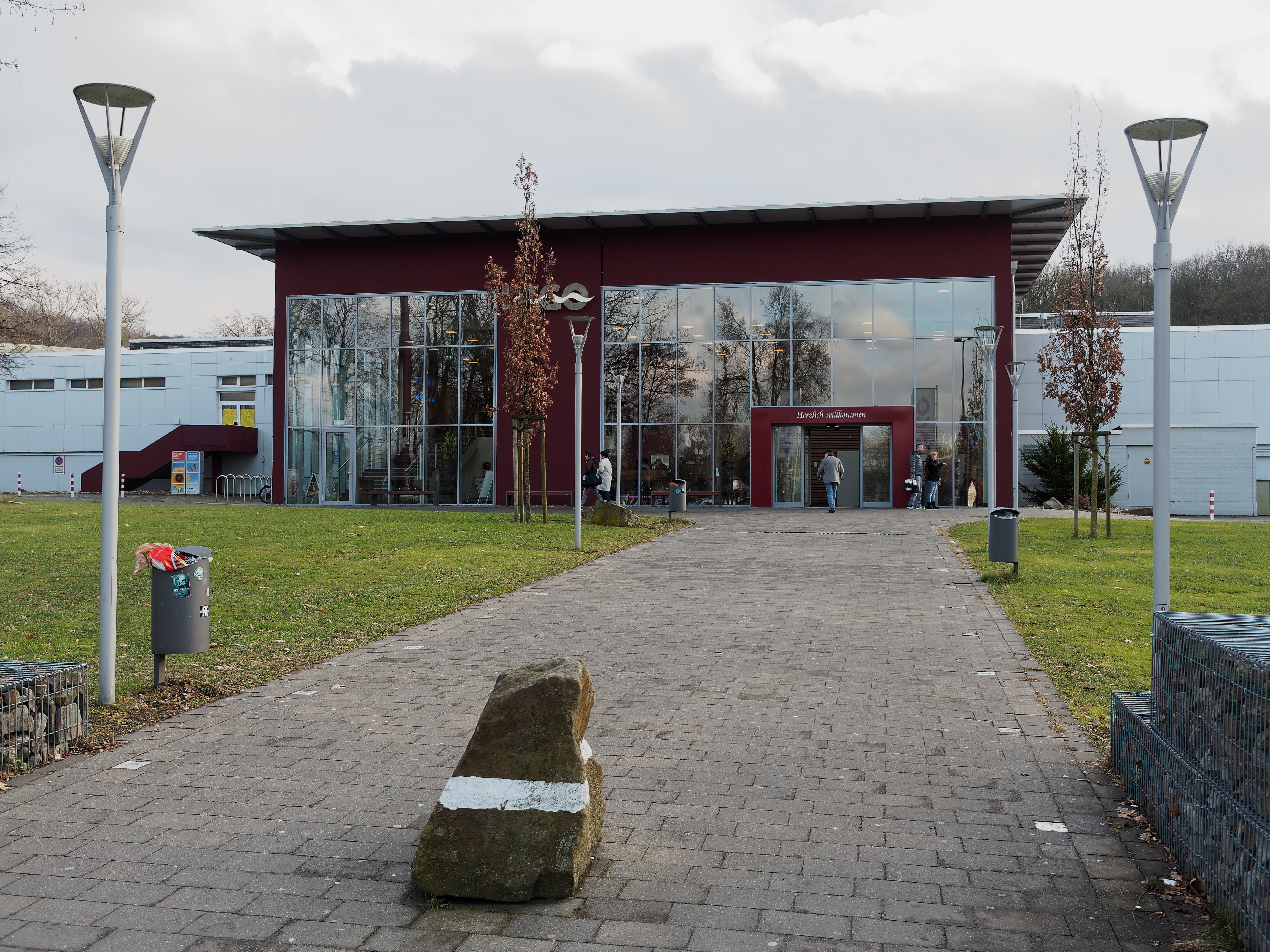 Das Lago, ein Schwimmbad mit Sauna und Wellnessbereich im Revierpark Gysenberg in Herne Sodingen, Eingangsbereich